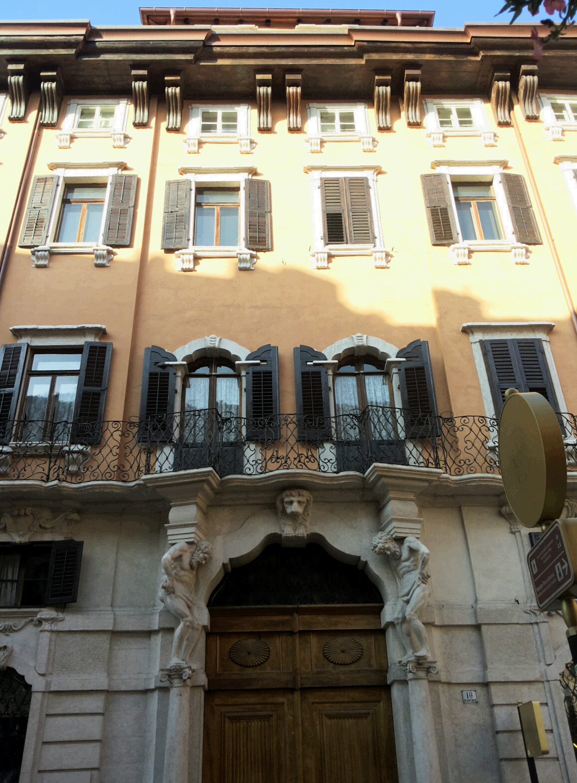 Palazzo Larcher-Fogazzaro a Trento. Edificio del tardo barocco eretto dalla nobile famiglia Guarinoni.